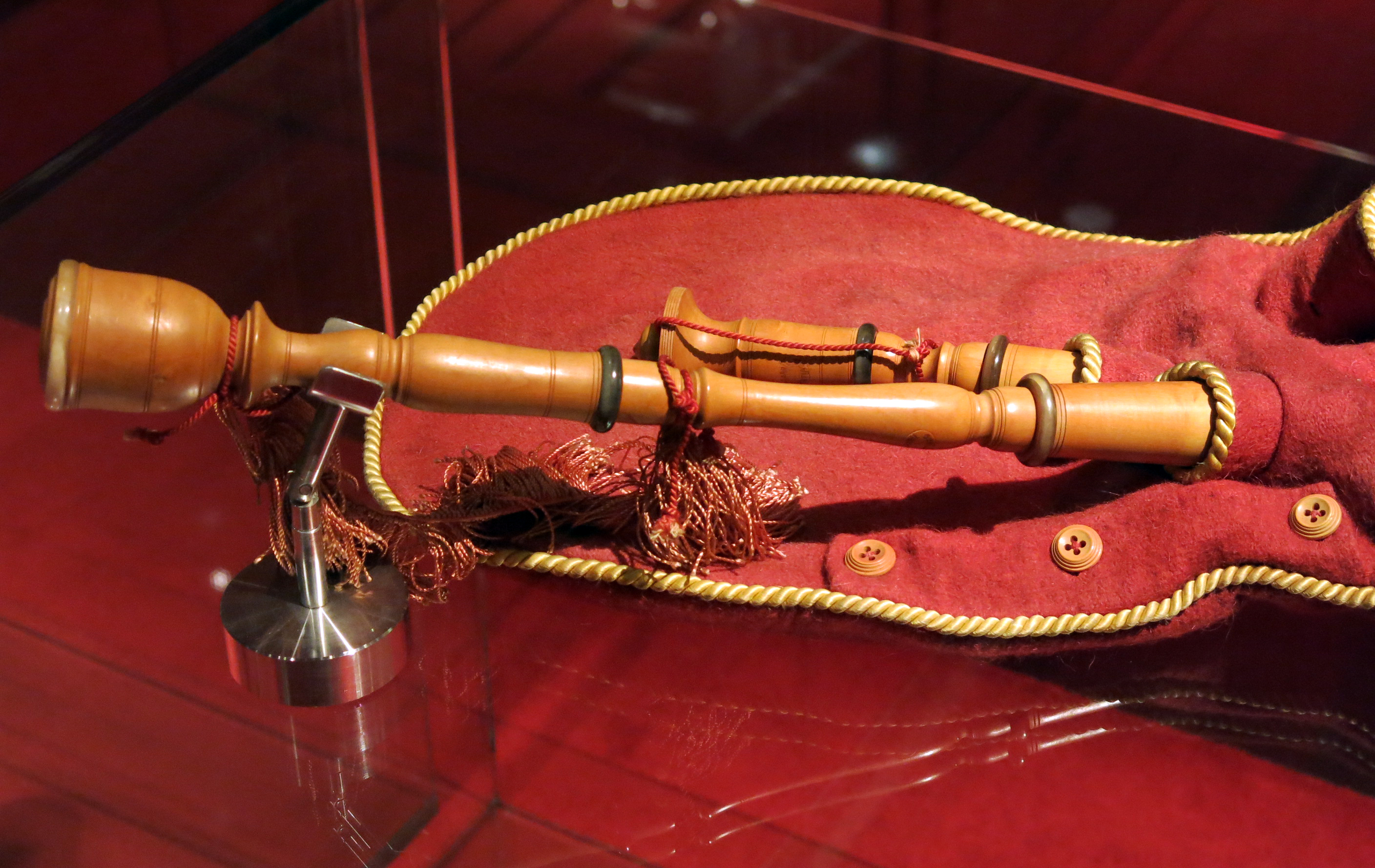 Gaita tumbal by Carril, Basilio. Santiago de Compostel•la. 1927 - 1974. Museu de la Música de Barcelona. (MDMB 338).